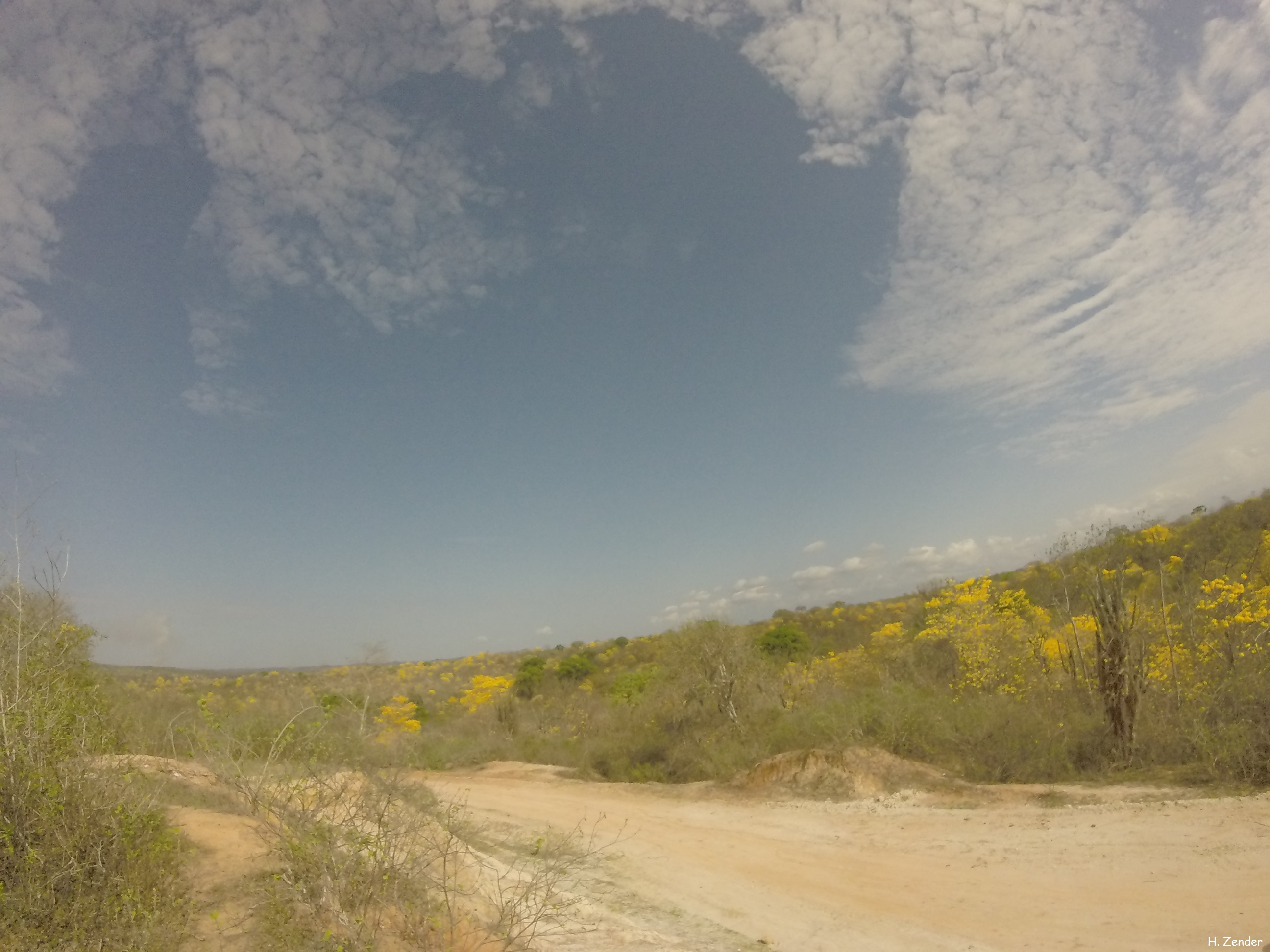 Temporada Seca